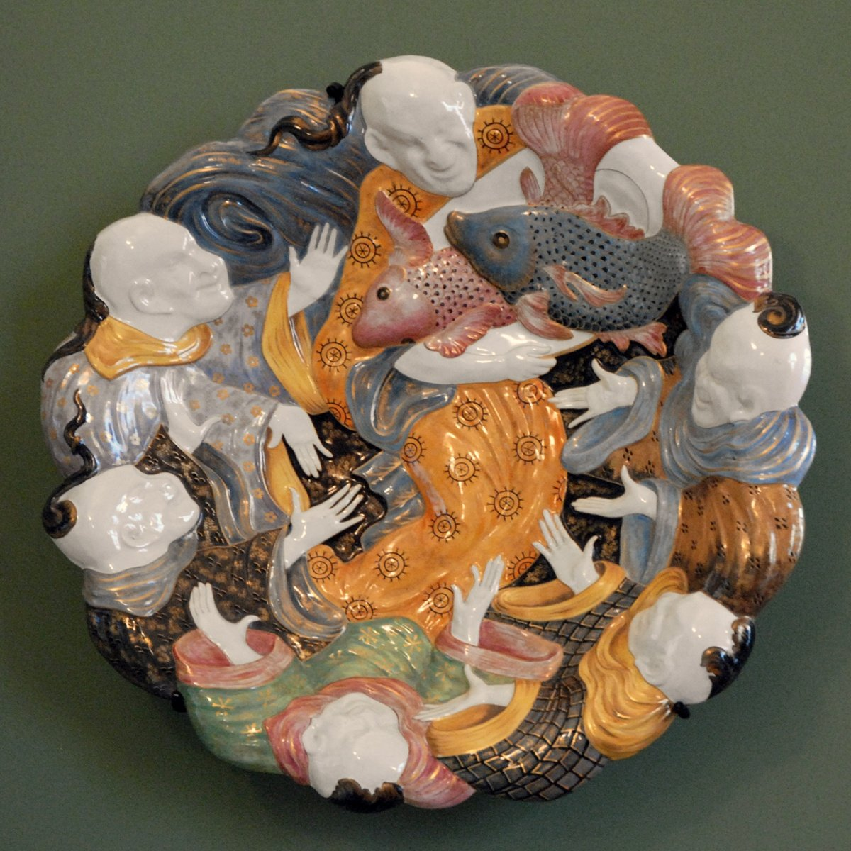 Plat d'ornement vers 1878 d'Emile Gallé (1846-1904) Faïence, décor de petit feu, rehaurs d'or acquis par le musée d'Orsay en 1982